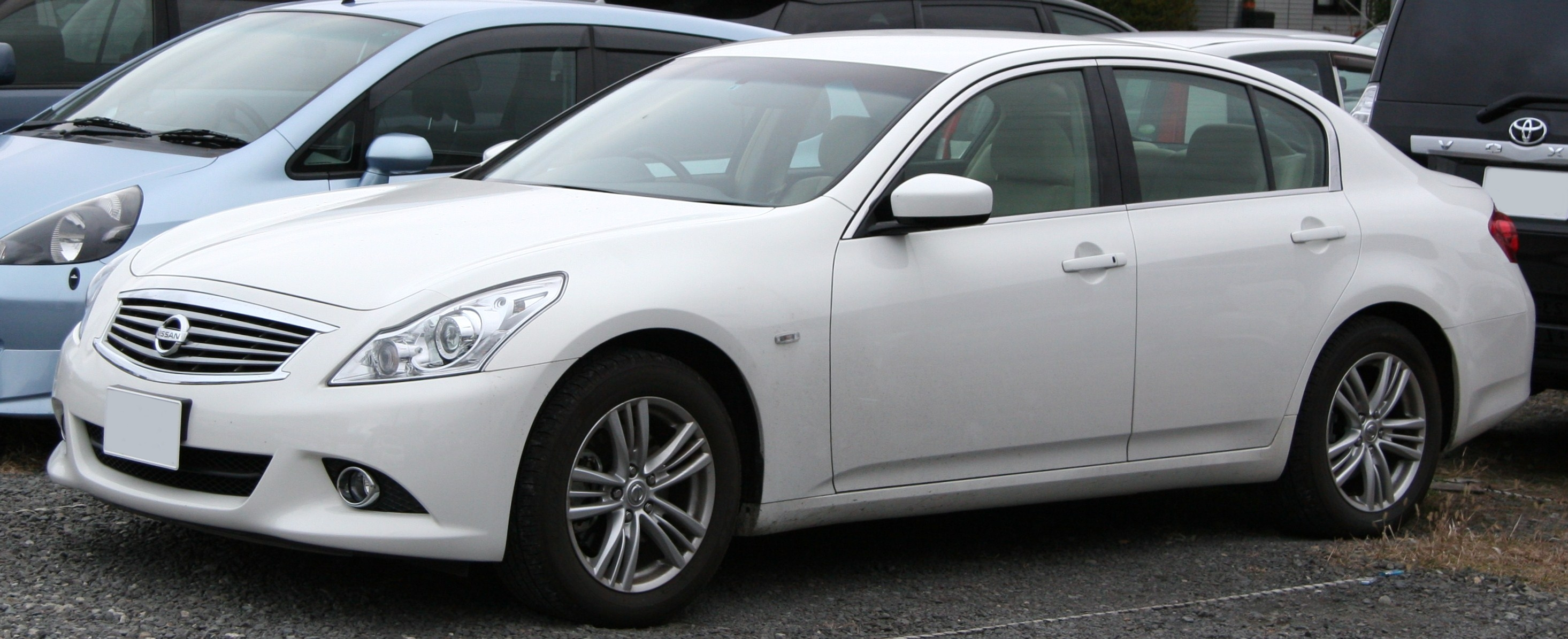 Nissan Skyline Sedan V36